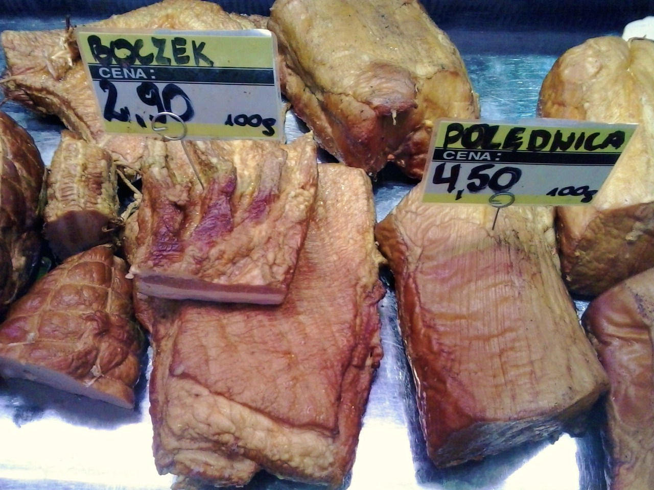 Polski boczek i polędwica. Smaki Regionów, Poznań 2014r.